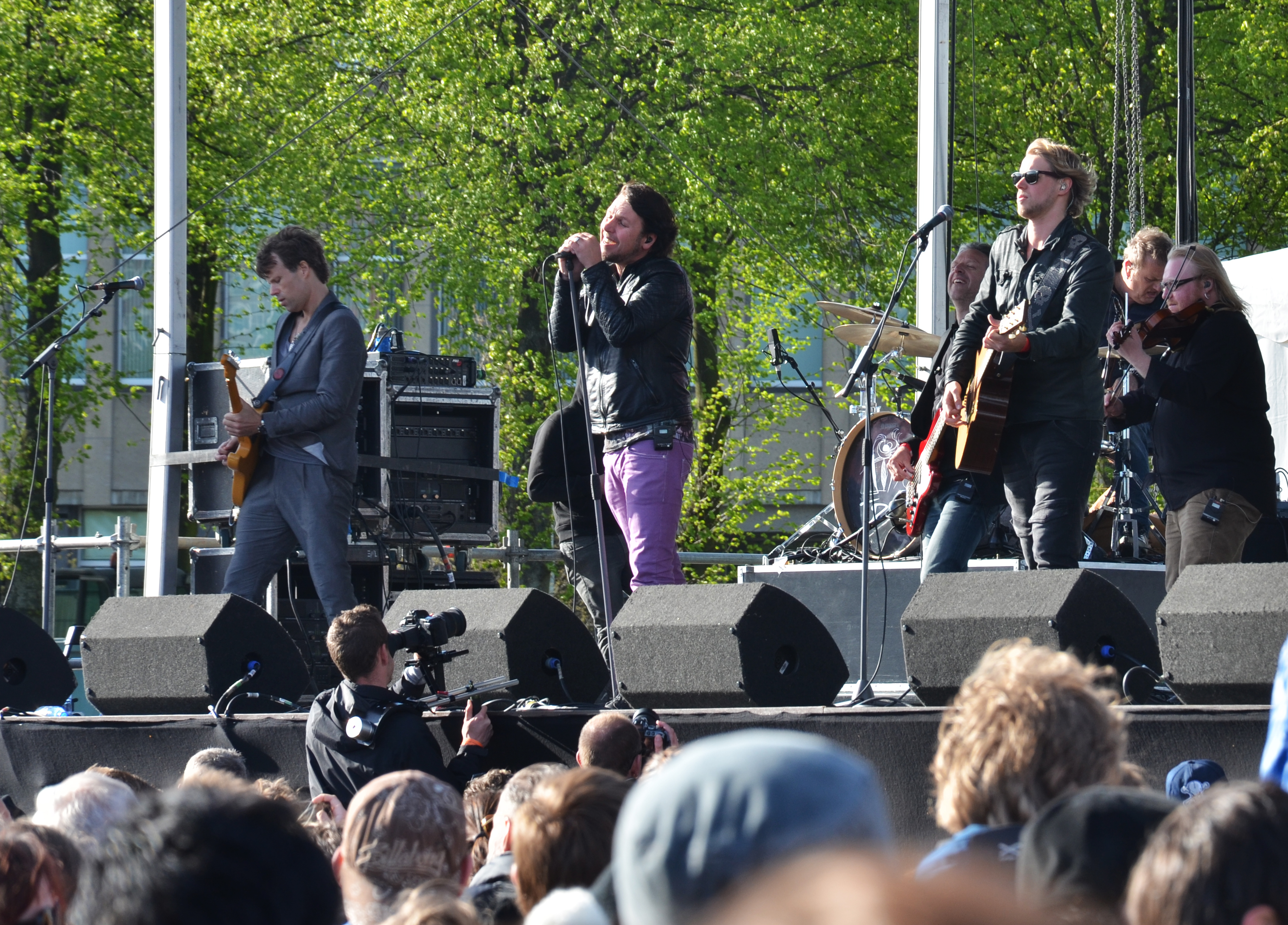 3JS op het Bevrijdingsfestival in Den Haag in 2015.